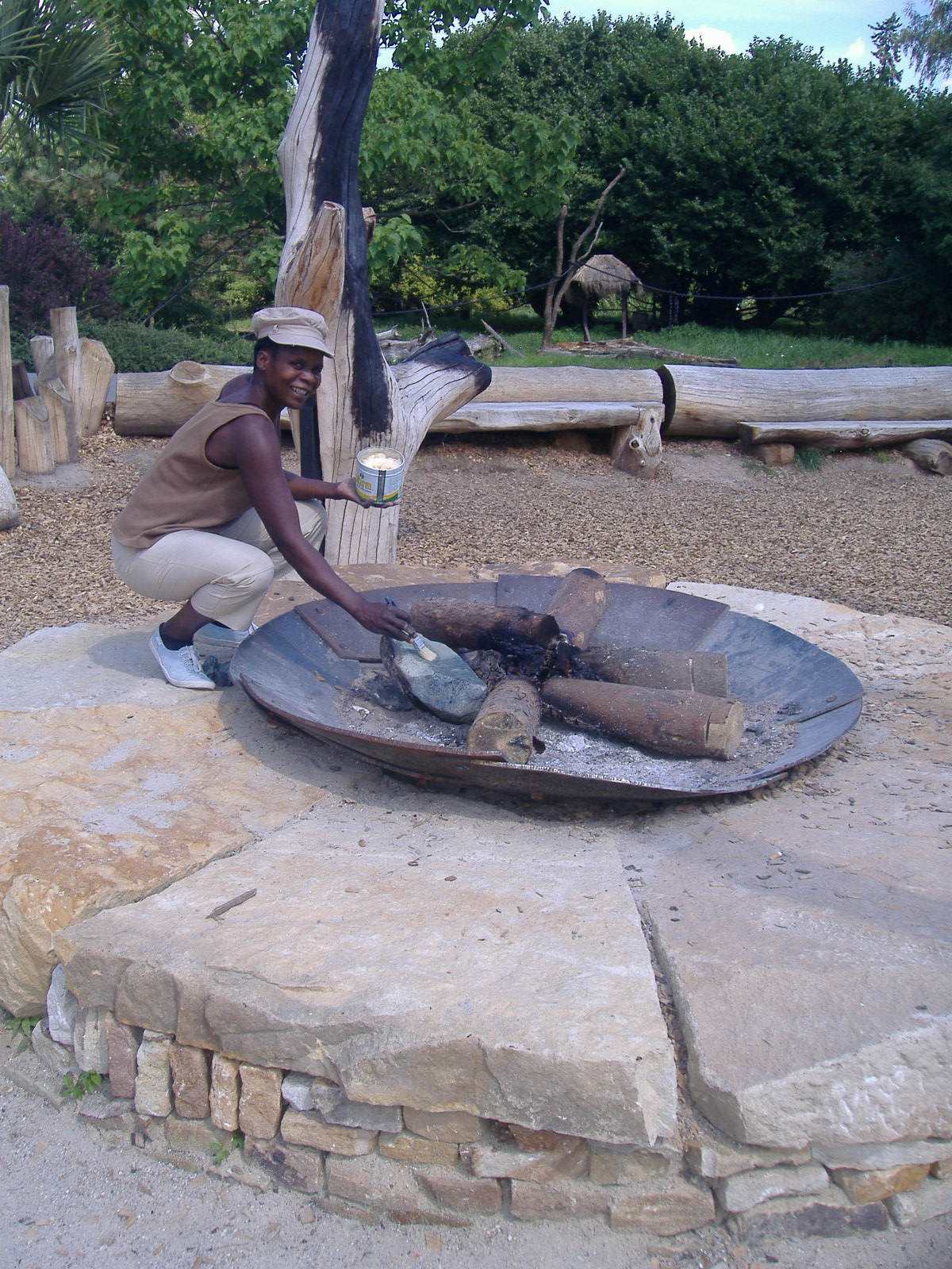 Maudy Muhoni, zimbabwská kamenosochařka, na svém workshopu v ZOO Hradec Králové v roce 2014.